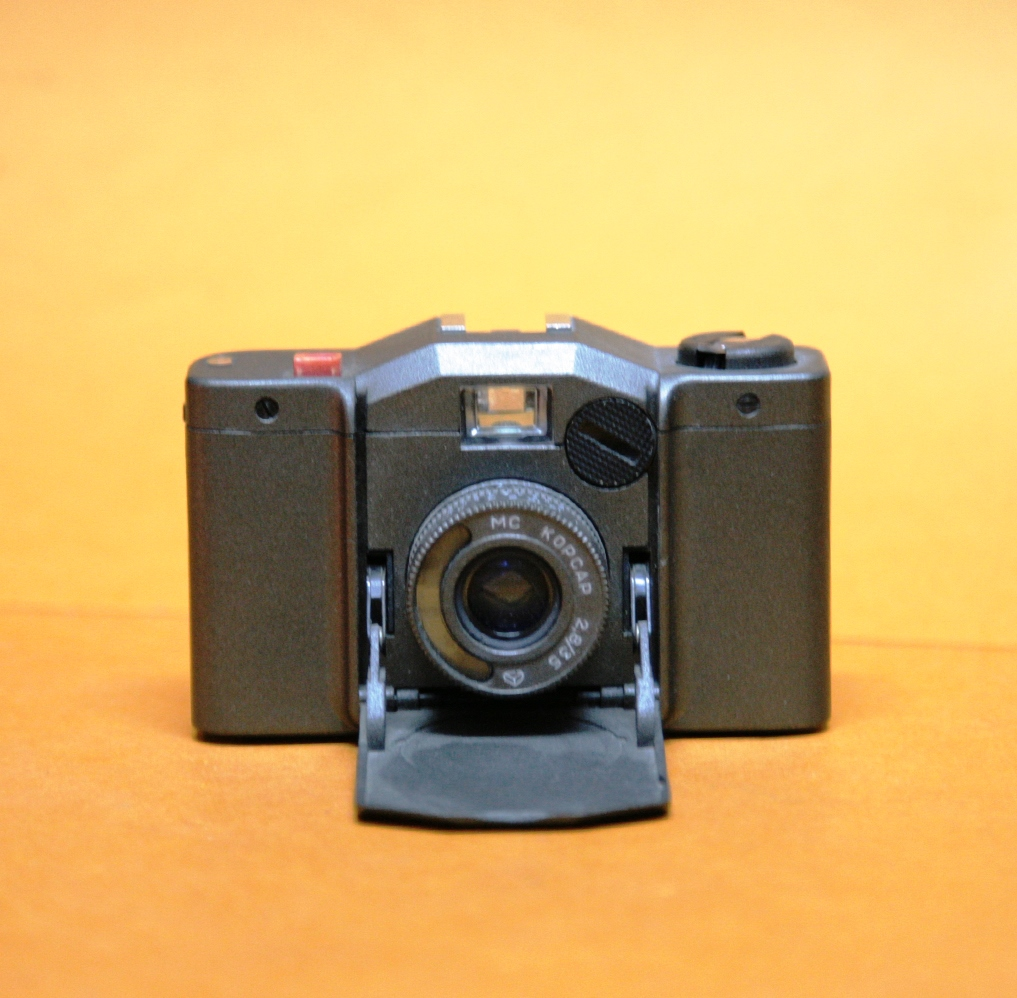 Coll. Marcè CL - KIEV 35 A 24x3 6mm, obiettivo MC Korsar 2.8/35; prodotta nel 1985-1991[1]